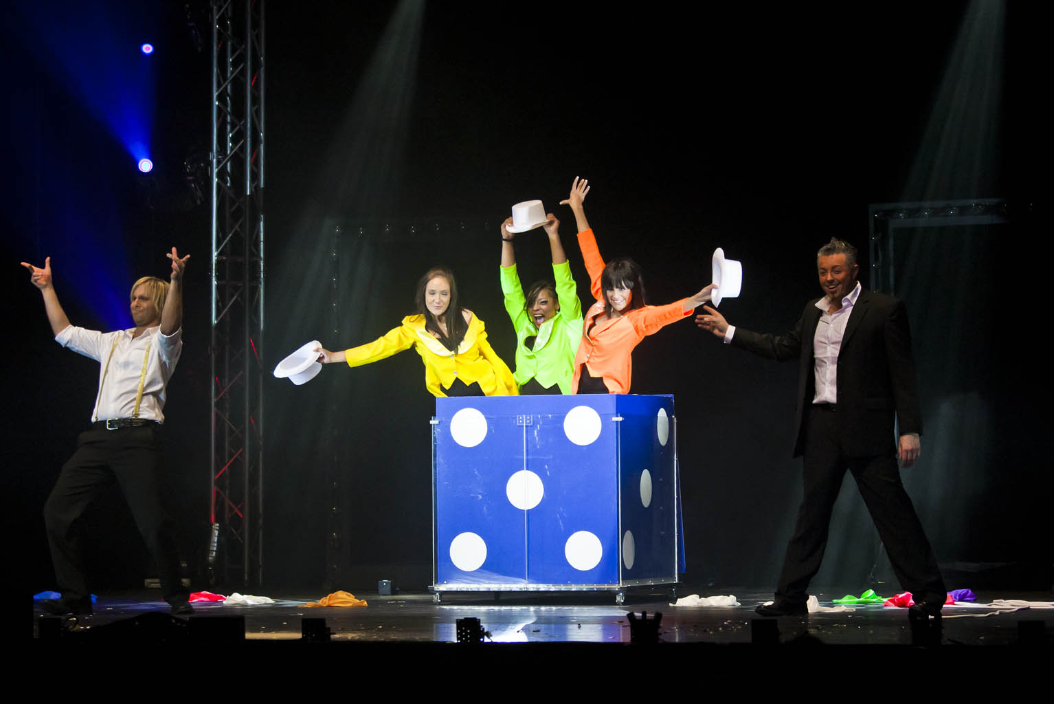 Marc & Alex Würfel Balingen 2010